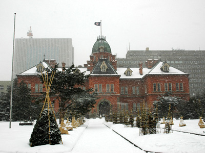 大雪中的舊北海道廳 北海道是日本一級行政區之一，也是日本列島第二大的島嶼。zh:1886年原本在北海道島上的三個縣合併設道，並且將行政中心設於zh:札幌市。 圖中所見是位於札幌市中央區的zh:北海道廳舊紅磚廳舍，是棟zh:巴洛克風格的紅磚建築。目前該機關實際的辦公地點已經遷至他處，原建築則成為國家指定古蹟與非常受歡迎的觀光景點。 本圖片由上傳者zh:User:SElephant拍攝於2004年12月。 Category:北海道